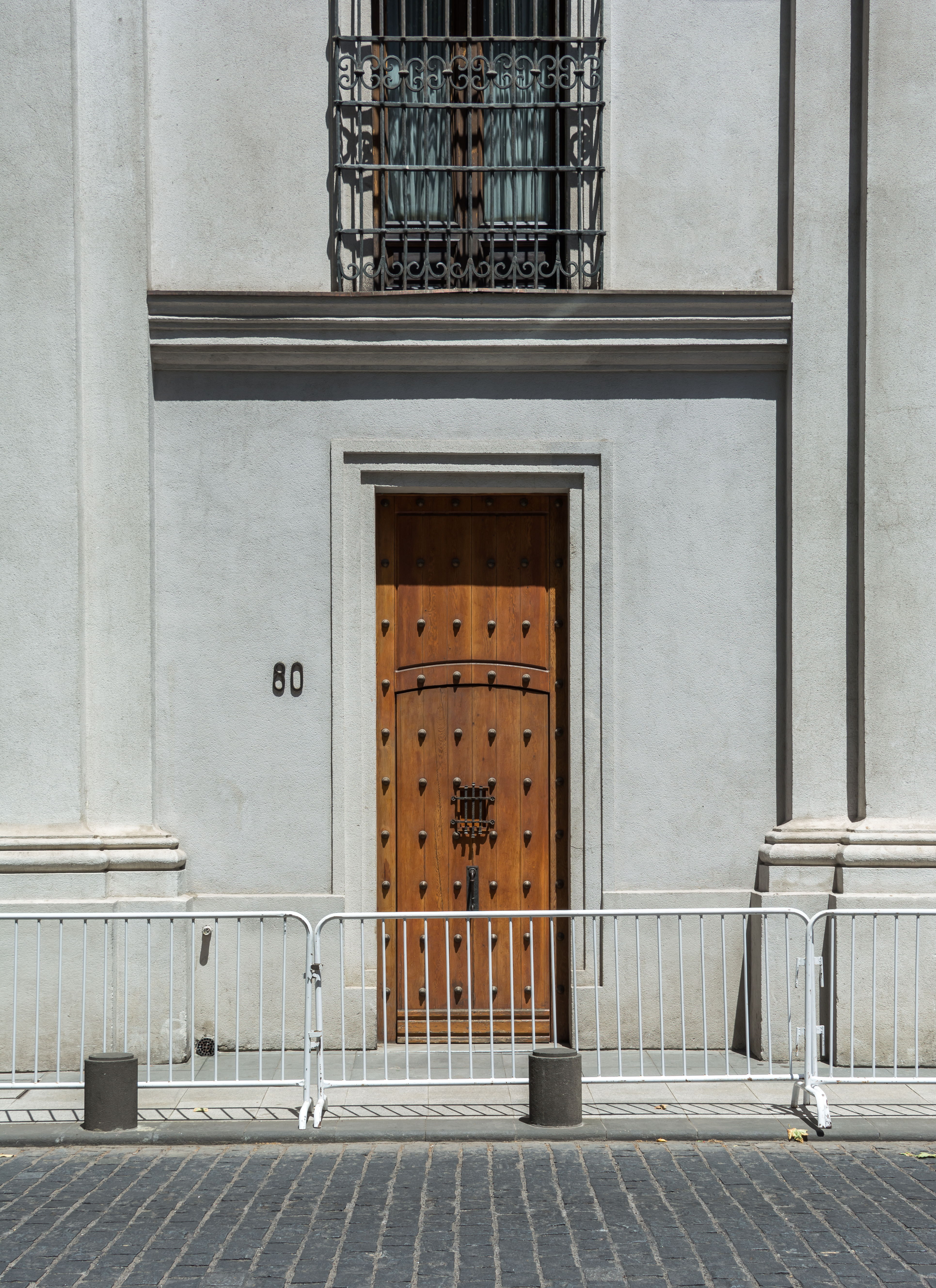 Morandé 80, Palacio de La Moneda, Santiago, Chile.